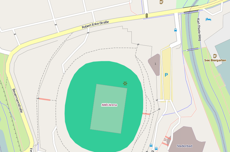 Robert-Enke-Strasse This map may be incomplete, and may contain errors. Don't rely solely on it for navigation.